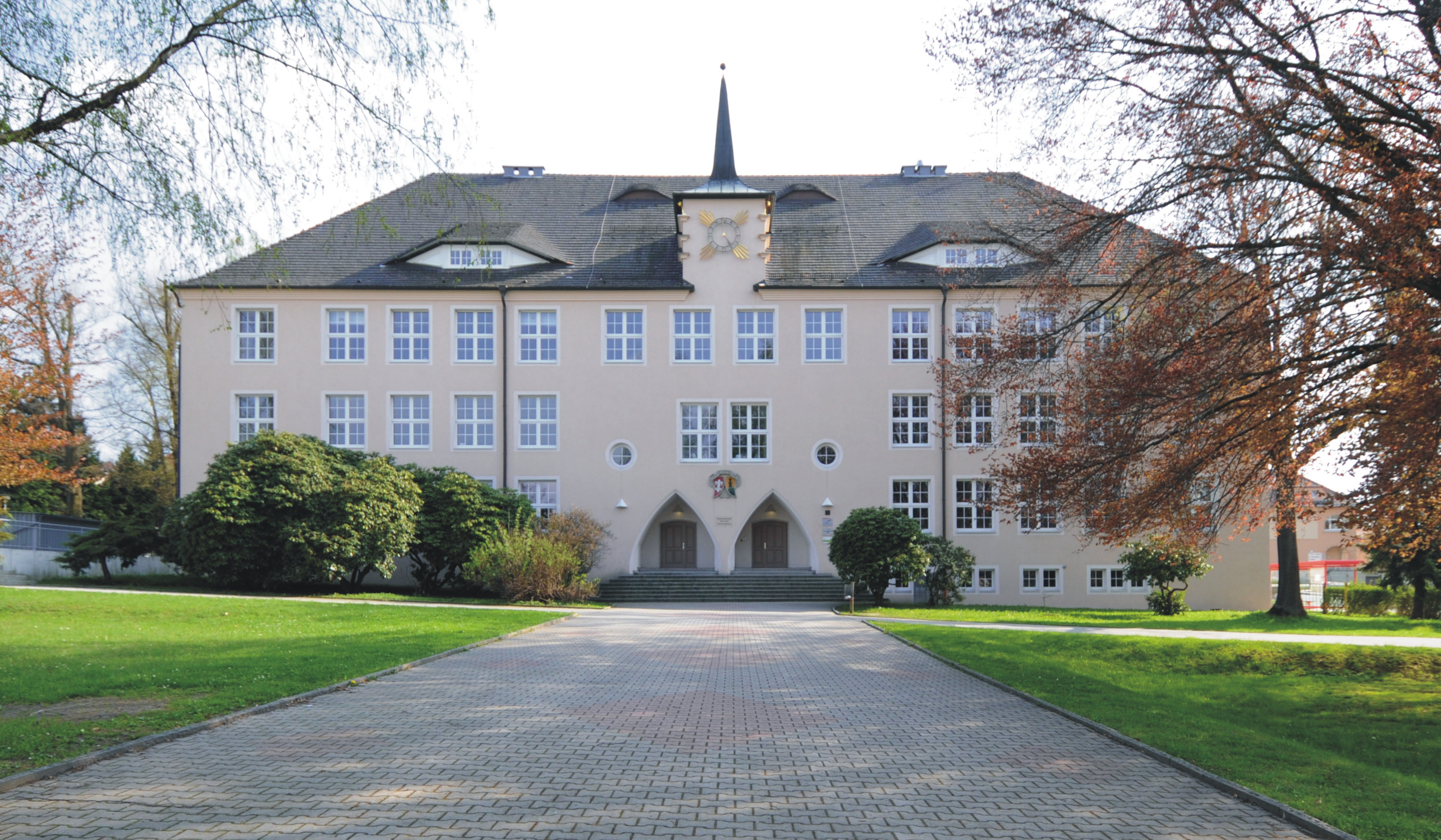 Gebäude der Pestalozzi-Schule (1928 eröffnet) in Neusalza-Spremberg (Sachsen, Deutschland)